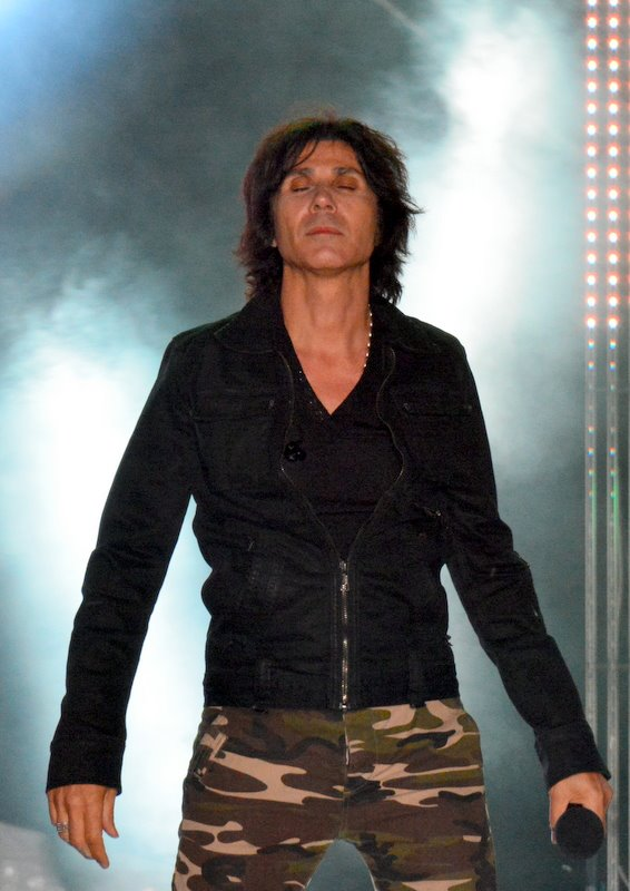 Jean-Luc Lahaye au concert "La Folie des années 80" à Enghien-les-Bains